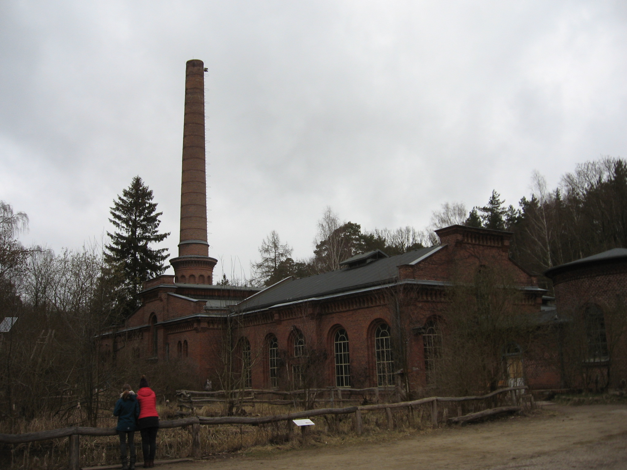 Ehemalige Pumpengebäude des heutigen Ökowerk Teufelssee von Südosten.